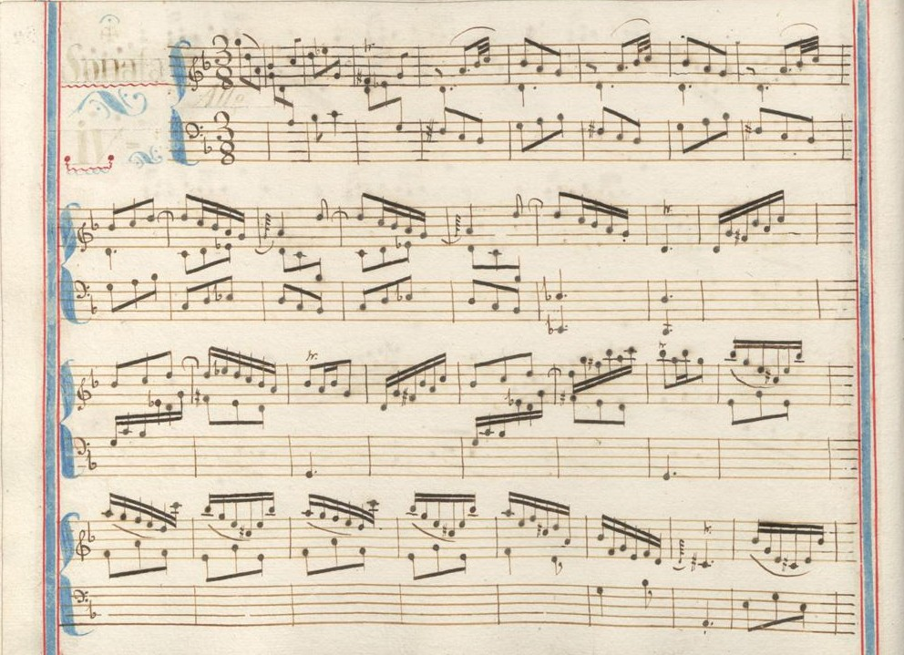 La sonate K. 102, telle qu'elle se présente dans le manuscrit de Venise, volume XV no. 4.